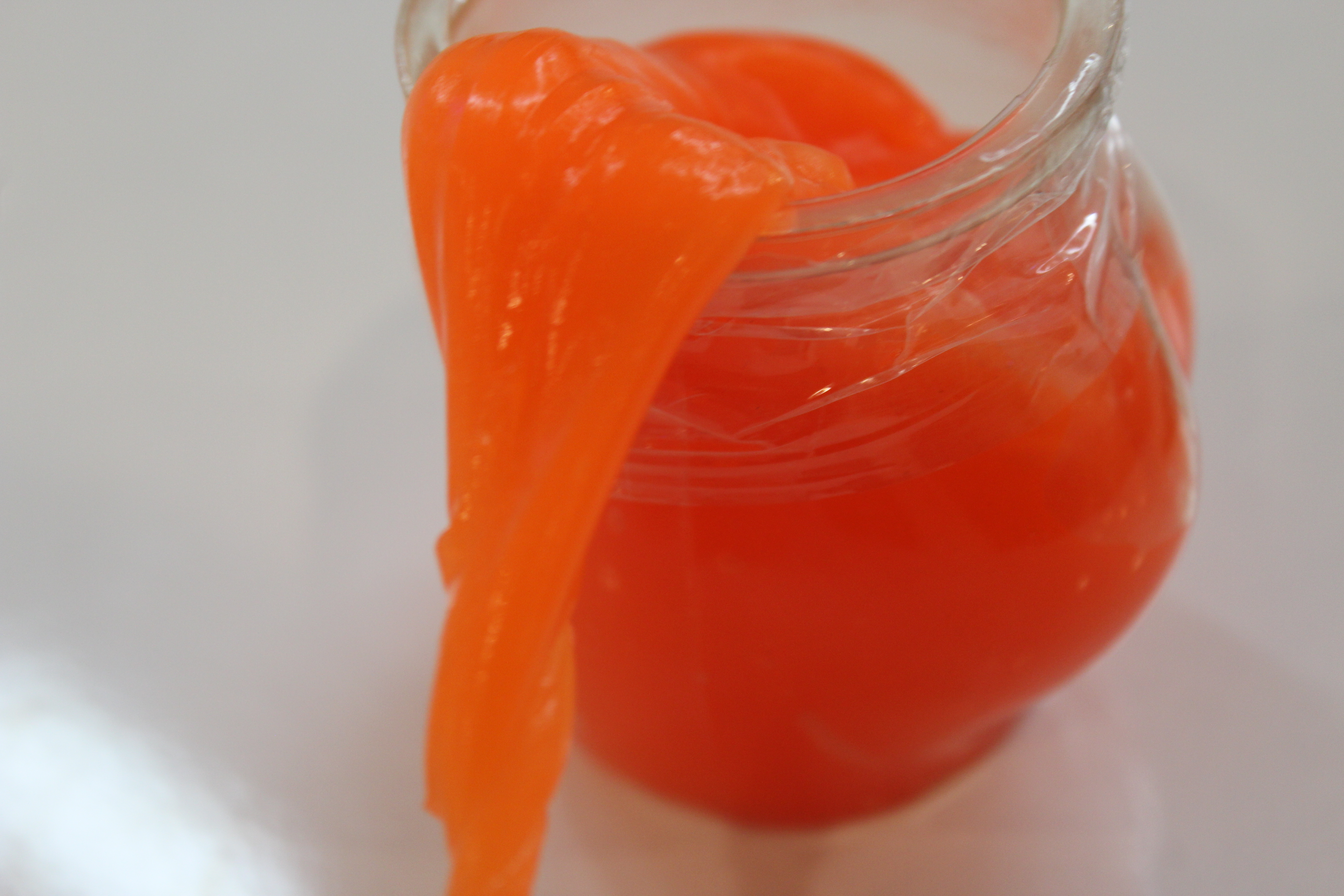 Fluffy Slime Kura-kura Tbilisi, Georgia.